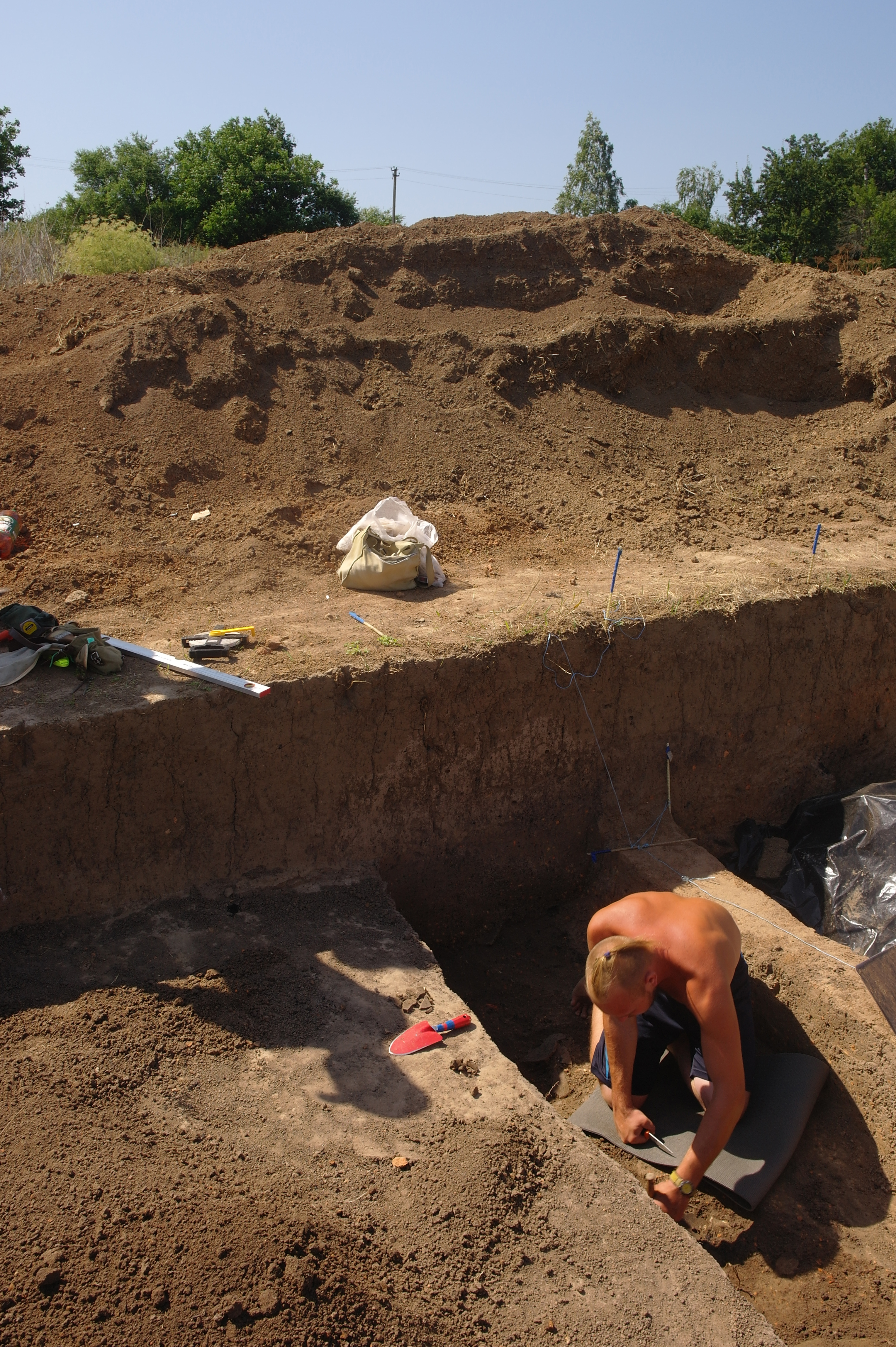 Археологічна експедиція на розкопках Пастирського городища